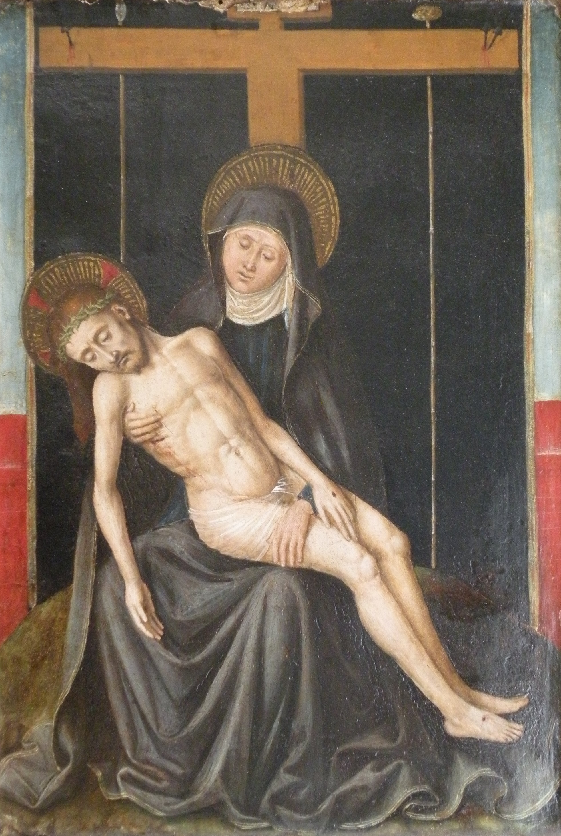 Pietà